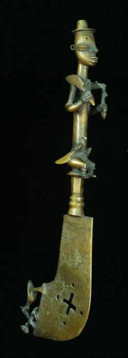 De grote beeldhouwtraditie van Abeokuta is in het midden van de eeuw gevestigd vanuit Egbado door twee rivaliserende families, de Eshubiyi in de wijk Ibara en de Adugbologe in het stadsdeel Itoko. Kenmerkend voor de Eshubiyi-school zijn volgens W. Fagg (in Fagg en Pemberton, 1982: 37) de verfijnde uitbeelding van kapsel en kleding. Ook vindt men vaak verwijzingen naar Eshu, die een altaar heeft op het Eshubiyi-woonerf. Alleen al daarom maken de Adugbologe-snijders geen beelden voor Eshu. De figuur van een krijgsman of jager die het gevest van dit zwaard vormt, verwijst naar een gebruik in de cultus van Ogun. Het ontbreken van een scherp ijzeren lemmet maakt het voorwerp ongeschikt om ermee te snijden of te hakken en geeft aan dat het alleen voor ceremonieel gebruik bedoeld was. Adepegba (1991: 38) merkt op dat deze zwaarden in heiligdommen worden neegelegd als wapen waarmee de godheid zijn aanhangers kan verdedigen. De stijl waarin de figuur is uitgevoerd met uitpuilende ogen en getuite lippen wijzen op een herkomst uit Abeokuta.